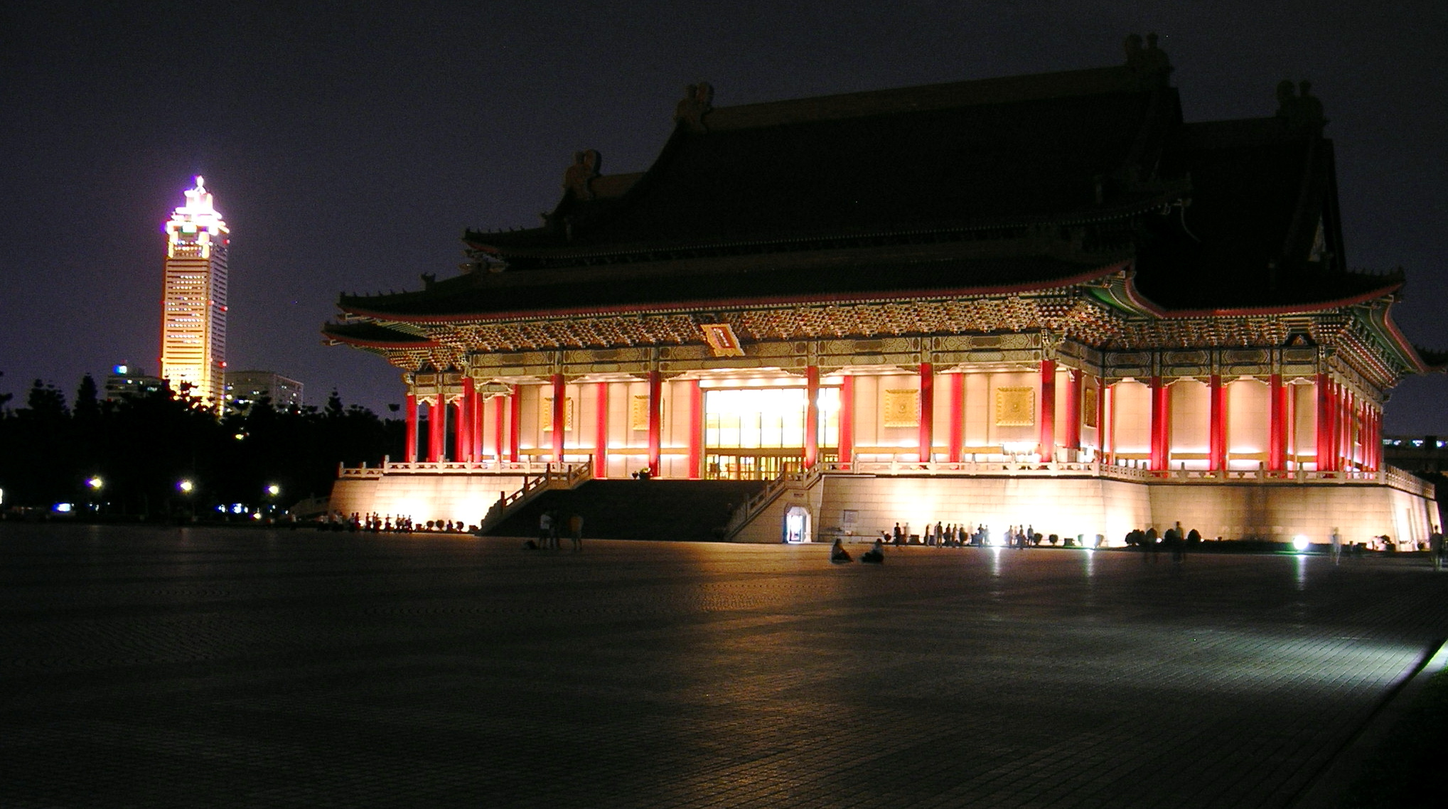 中文（台灣）: 國家音樂廳與新光人壽保險摩天大樓夜景。